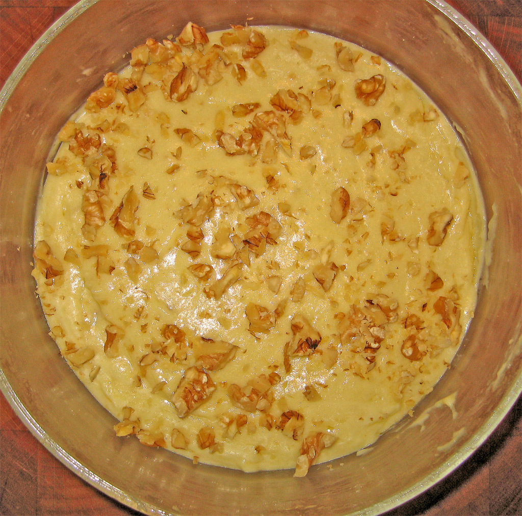 Skordalia, griechisches Knoblauchpüree